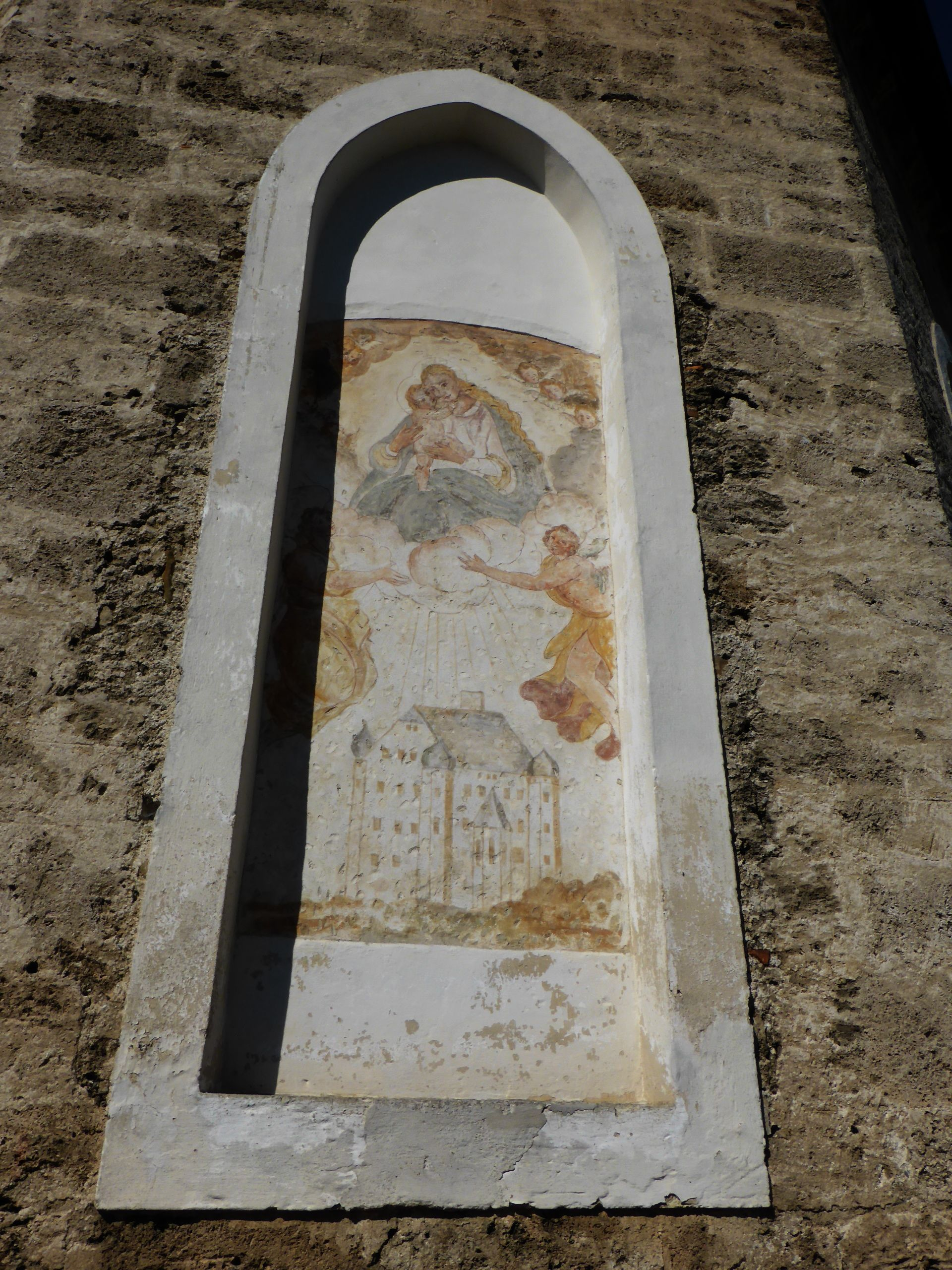 Kirchanschöring (Kirchstein Frasko von Schloss Lampoding auf der Kirche in Kirchstein)